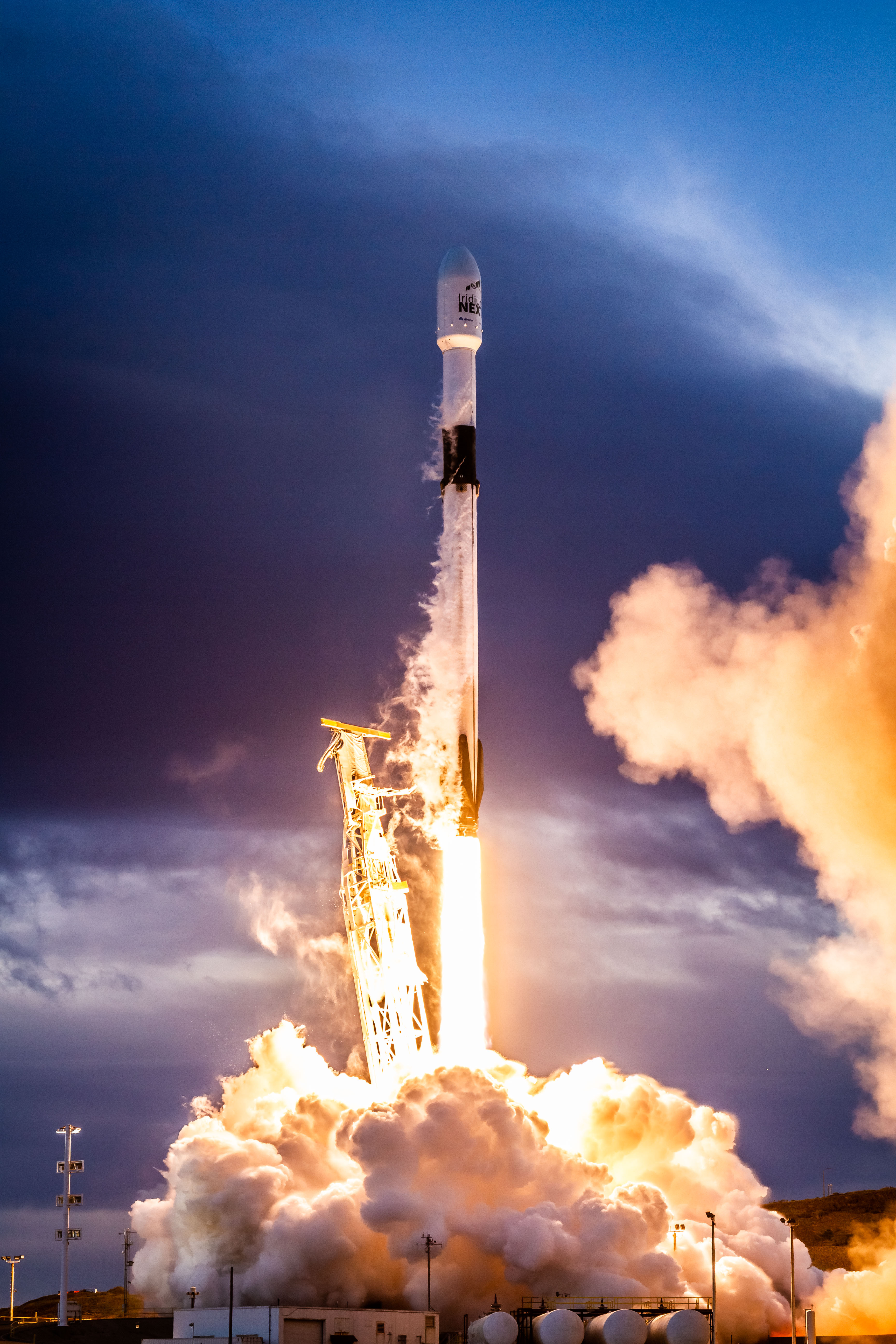 Iridium-8 Mission